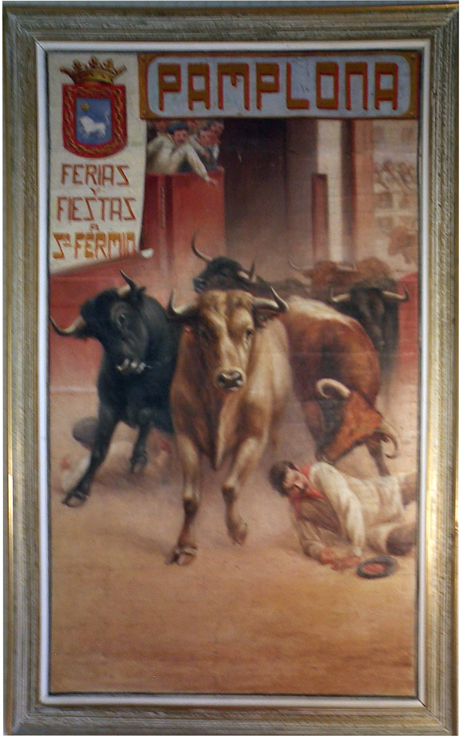 Oleo que en su tiempo ganó el concurso para la portada del programa oficial de las fiestas de San Fermin. Año 1911. El cuadro fue un obsequio del pintor a Isidoro Calvete y ahora es propiedad de Louis Calvete.